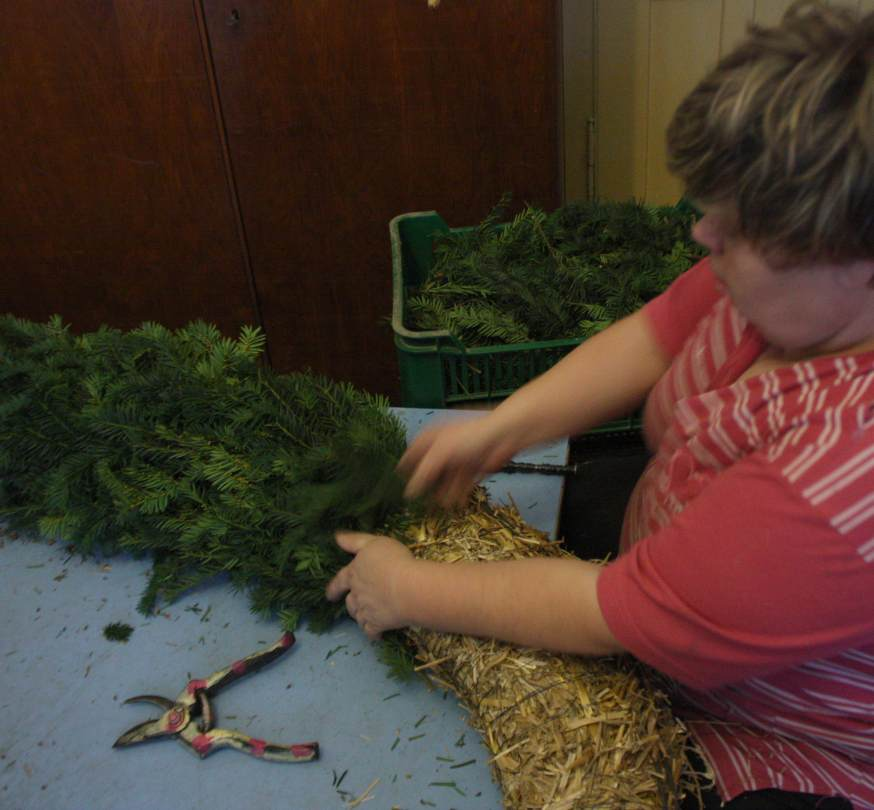 aranžování